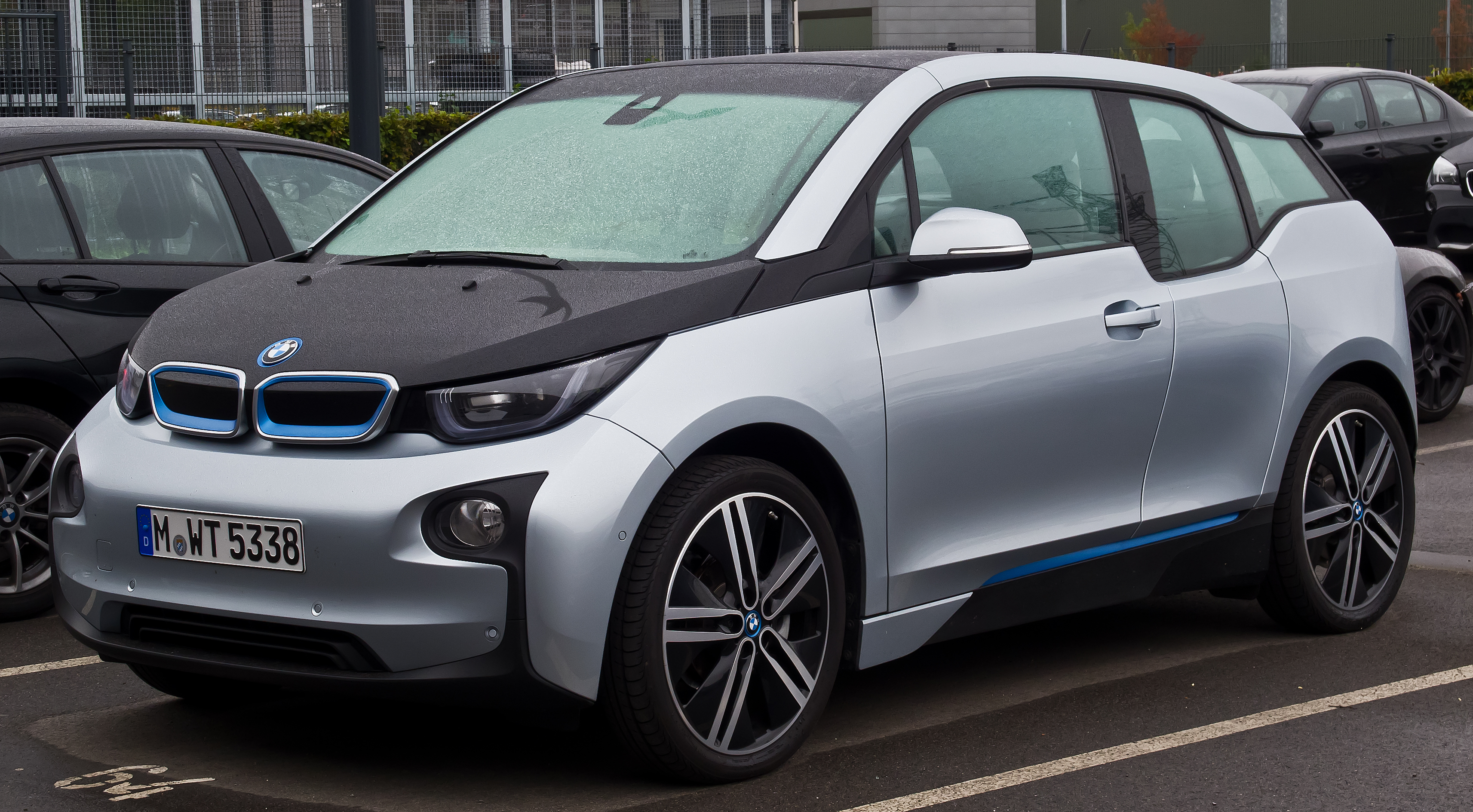 BMW i3